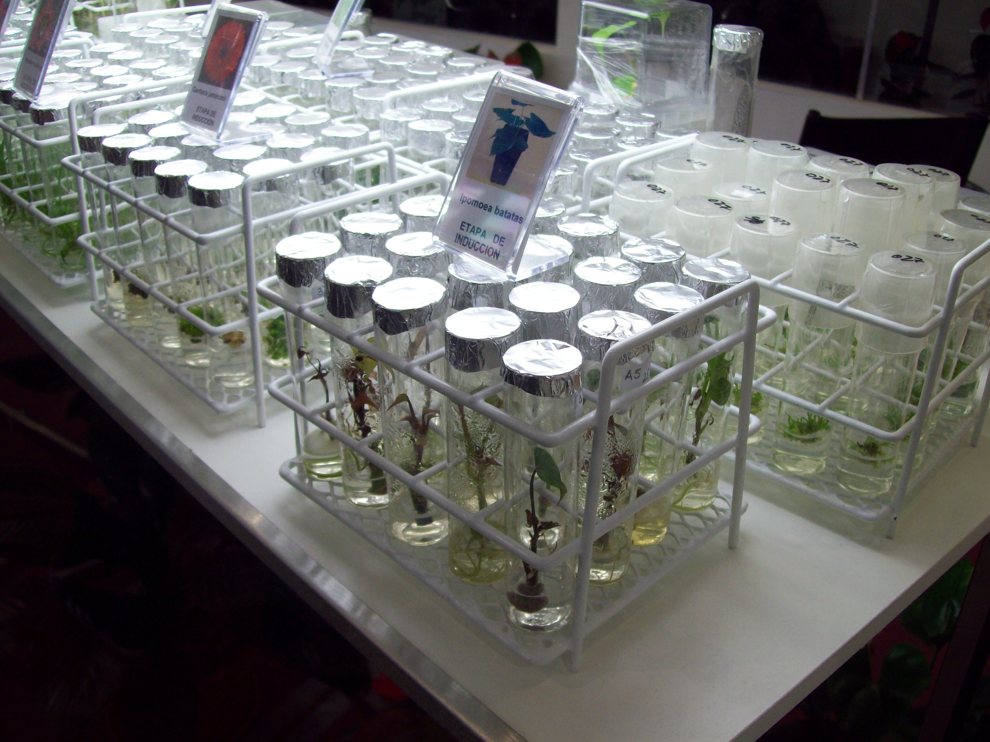 Cultivos de Ipomoea batatas en etapa de inducción, en Tecnópolis.